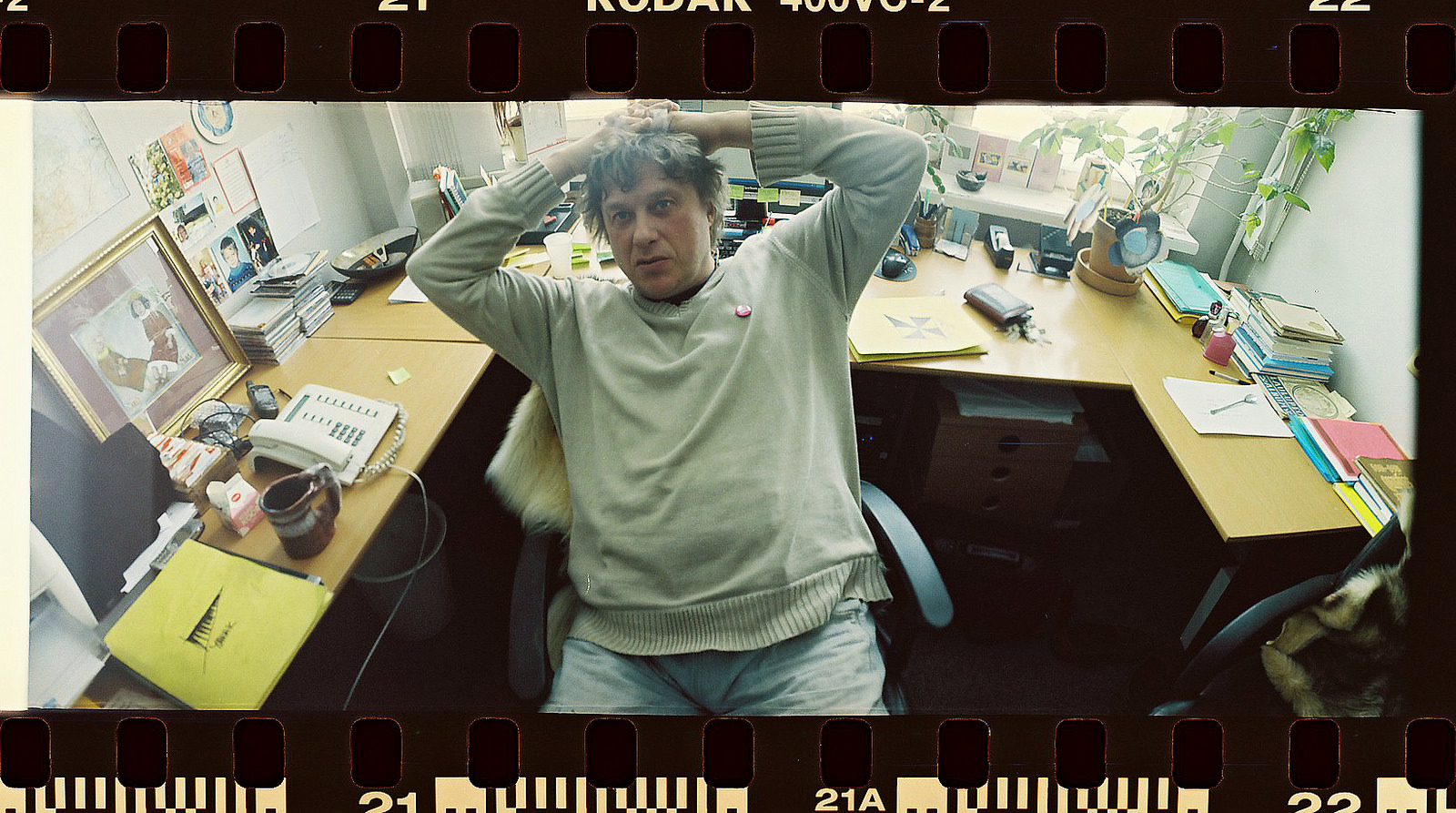 Loodusemees Juhani Püttsepp 2009. aasta kevadel Tartus, Maaülikoolis.